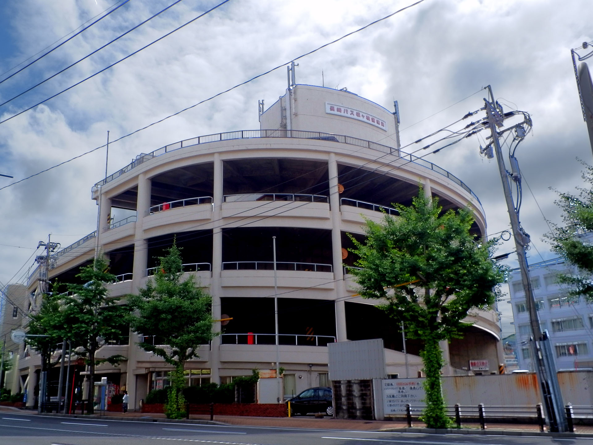 長崎バス松ヶ枝営業所正面